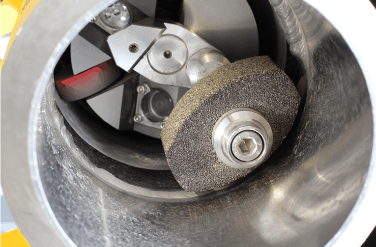 Bild eines kleinen Rohrinnenmanipulators mit einem Schleifstein (für festen Rohr-Durchmesser)